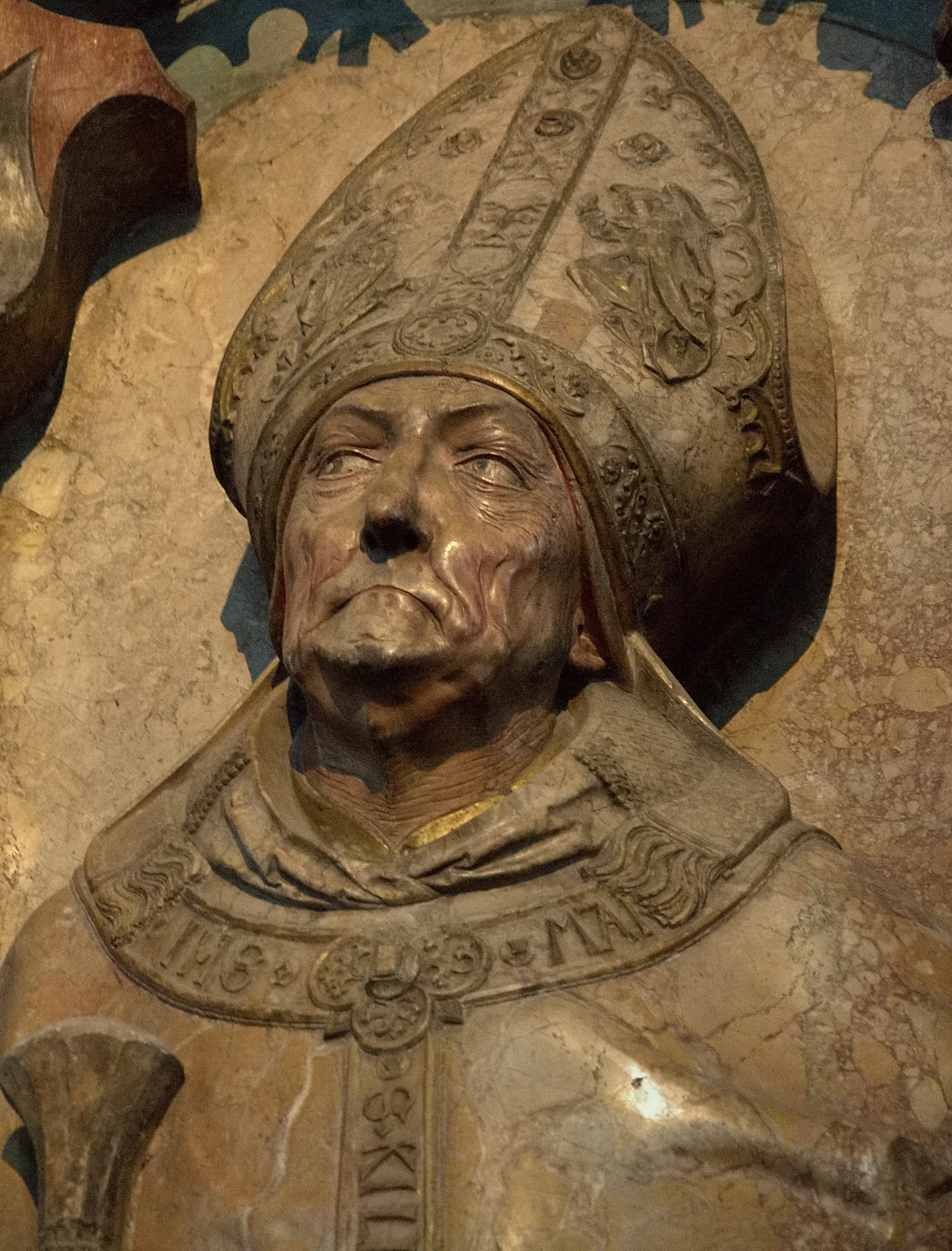 Ausschnitt aus dem Epitaphaltar des Rudolf von Scherenberg im Würzburger Dom, eine Arbeit von Tilman Riemenschneider